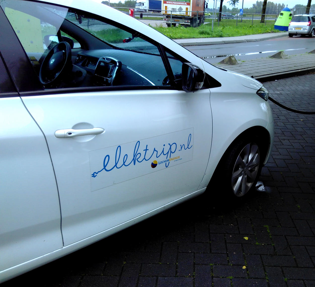 Elektrip deelauto Renault Zoë aan het laden (Nederland)